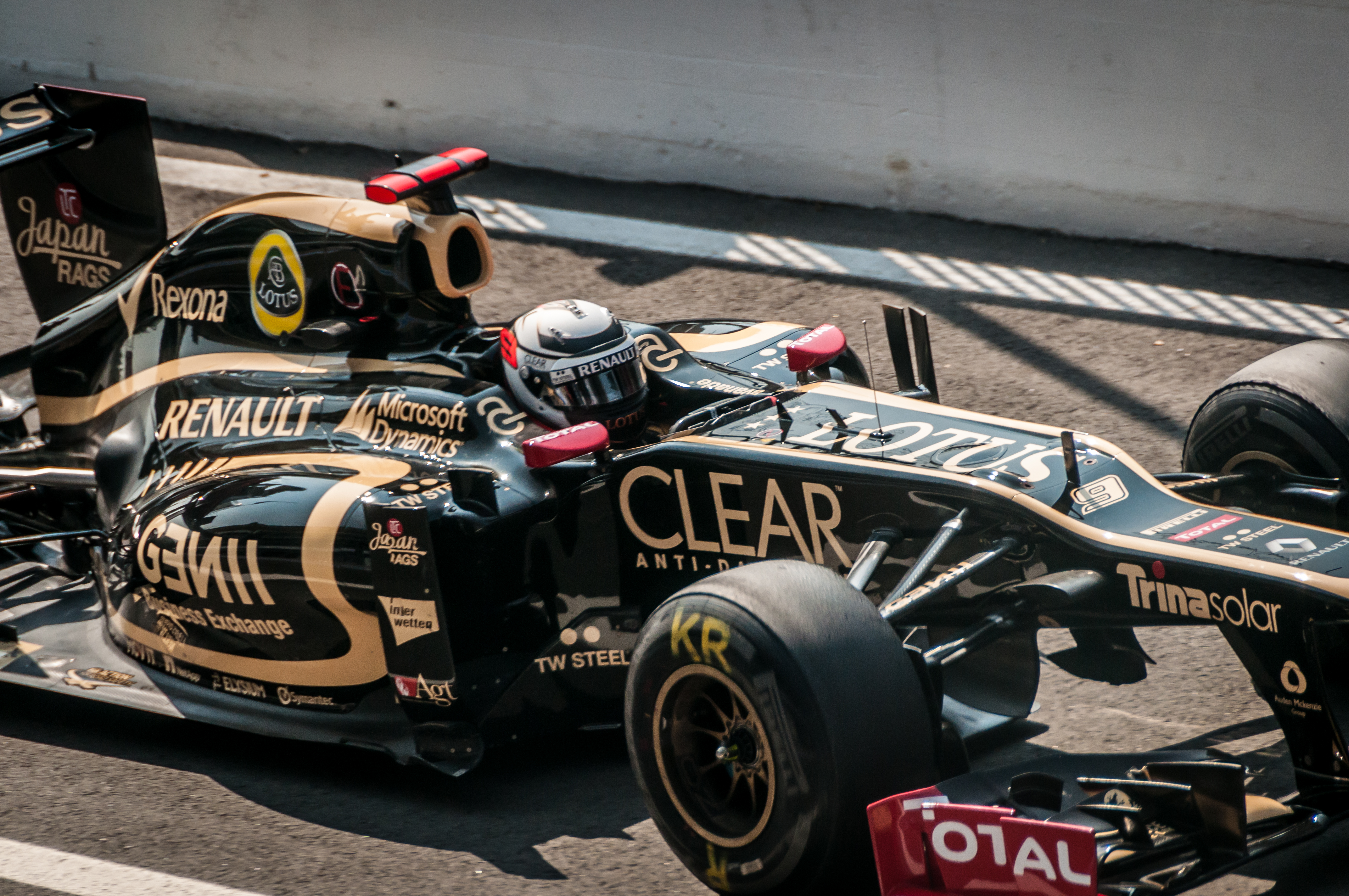 Raikkonen Italie 2012